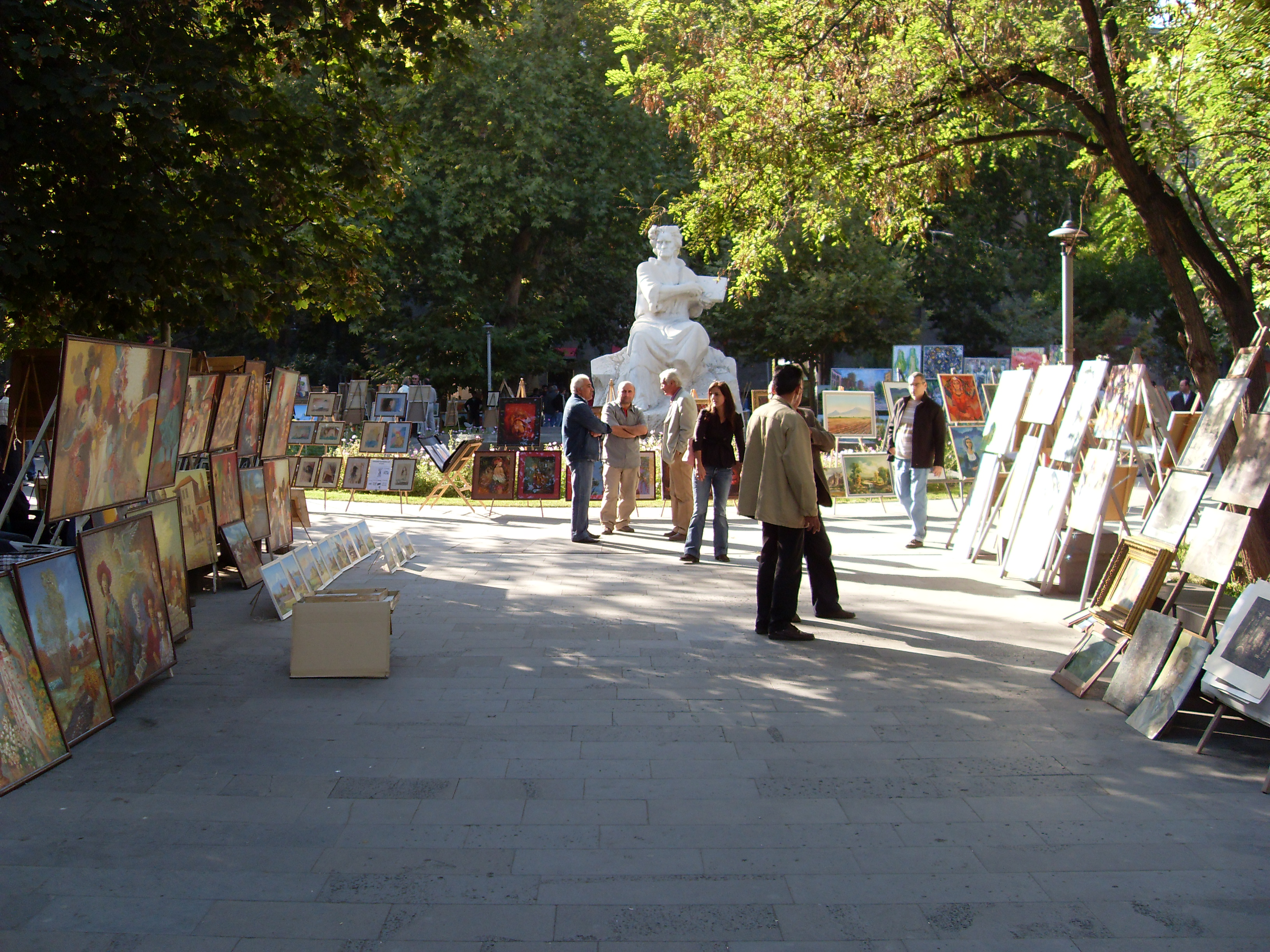 Մարտիրոս Սարյանի հուշարձանը Երևանում, 1986 թ., քանդ.` Լ. Թոքմաջյան, ճարտ.` Ա. Թարխանյան 6/141